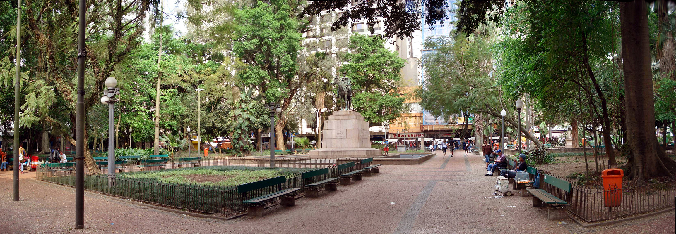 Vista parcial da Praça da Alfândega, em Porto Alegre, Brasil. Parte sul, com o monumento ao General Osório